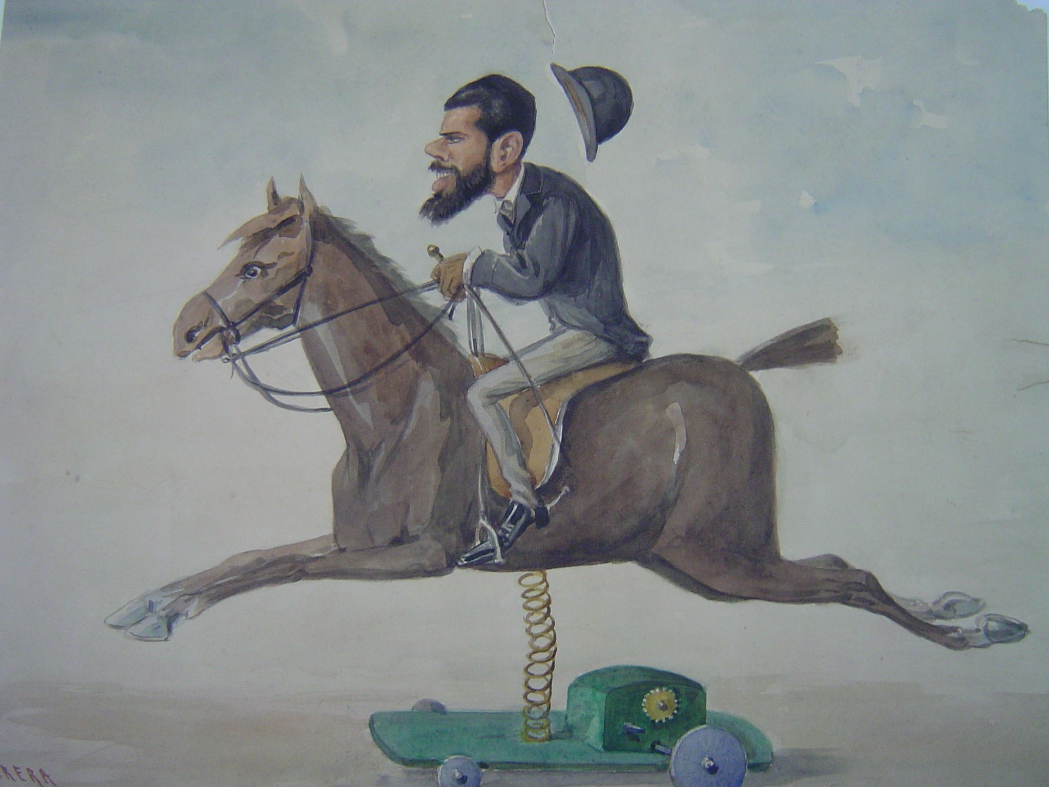 Figura d'un genet de cos desproporcionat. El cap és gros en relació el cos.